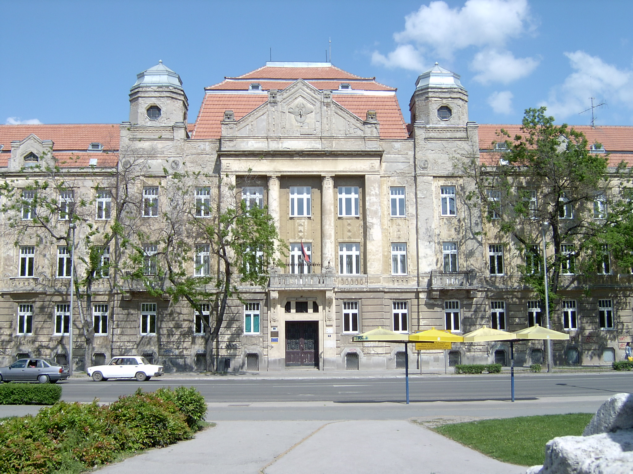 Technical School in Subotica, Serbia, Vojvodina/L'école technique à Subotica, Voïvodine, Serbie